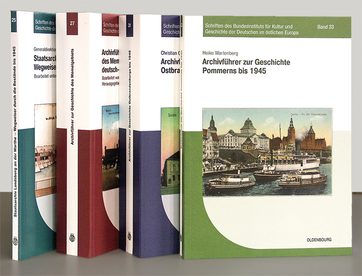 Archivführer BKGE Oldenburg